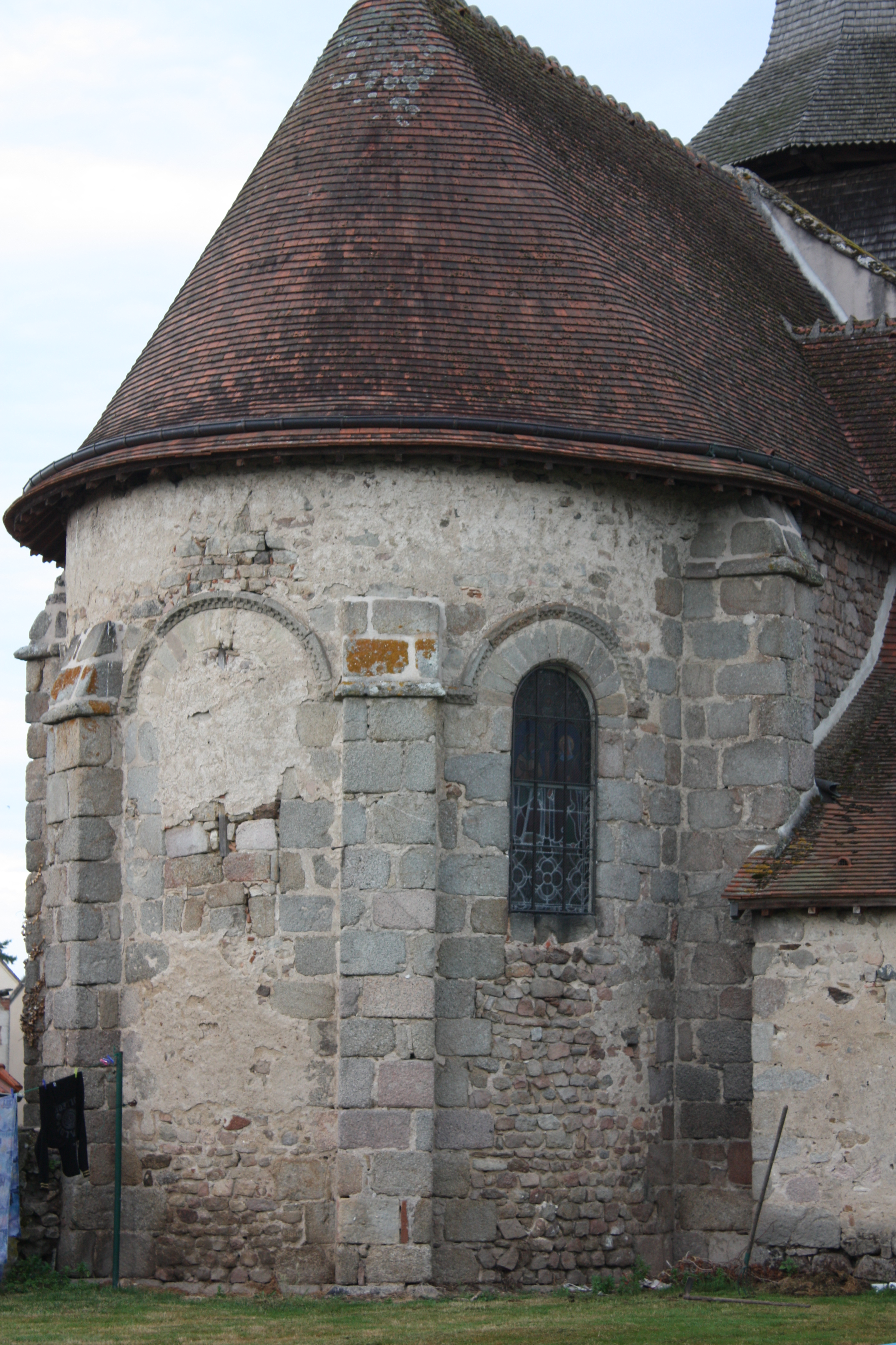 Nouhant - Eglise Saint-Martin Abside